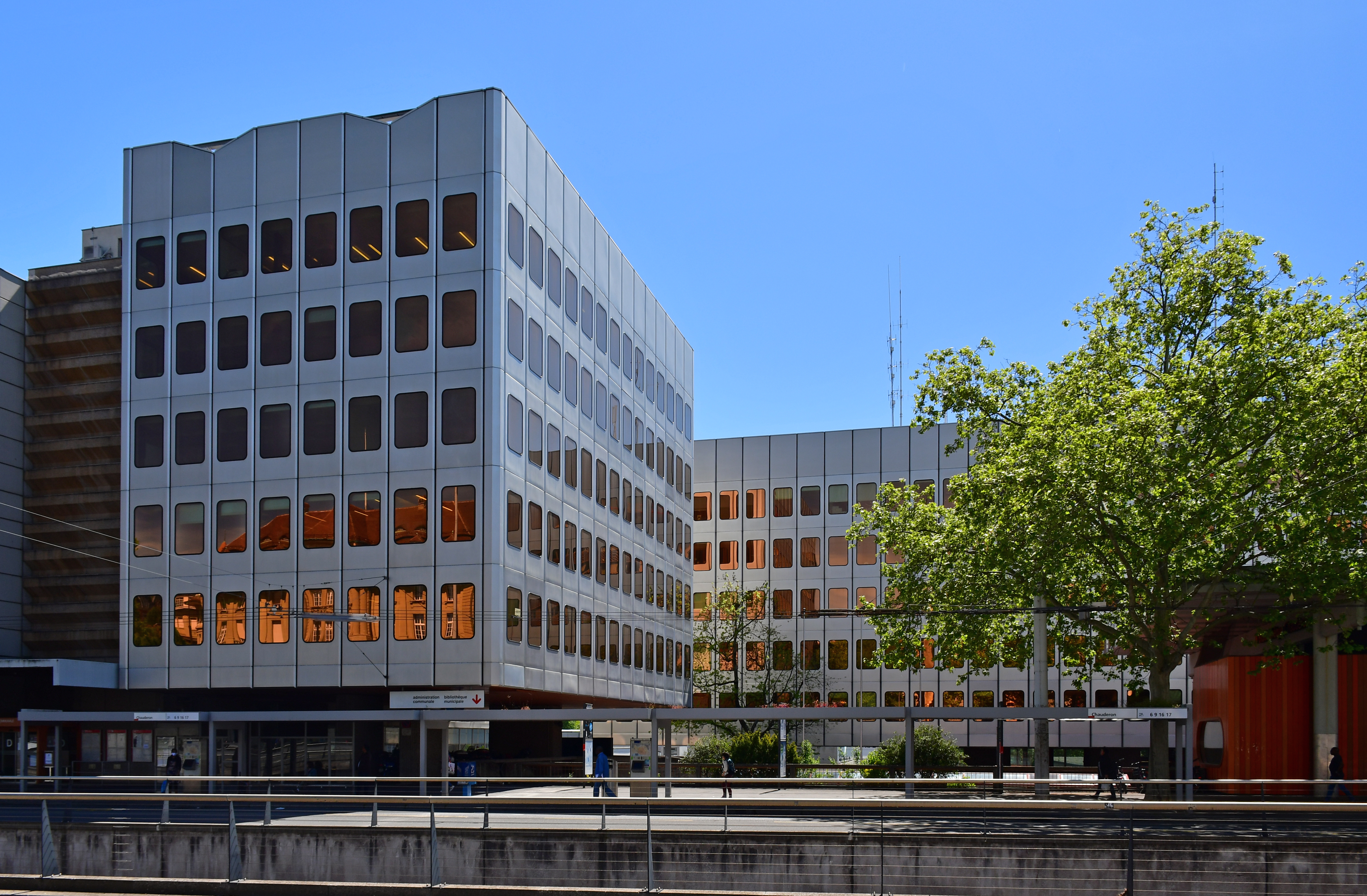 Les deux bâtiments de l'administration communale de la place Chauderon (Lausanne, Suisse), construits au sud-ouest de la place entre 1970 et 1974 par les architectes Roland Willomet et Paul Dumartheray avec l'aide de Jean Prouvé. Rectangulaires, habillés de plus de 700 panneaux de métal percés de hublots aux reflets cuivrés, les deux immeubles surplombent un socle qui, au sud, par des terrasses végétalisées, descend jusqu’au niveau du quartier du Flon.